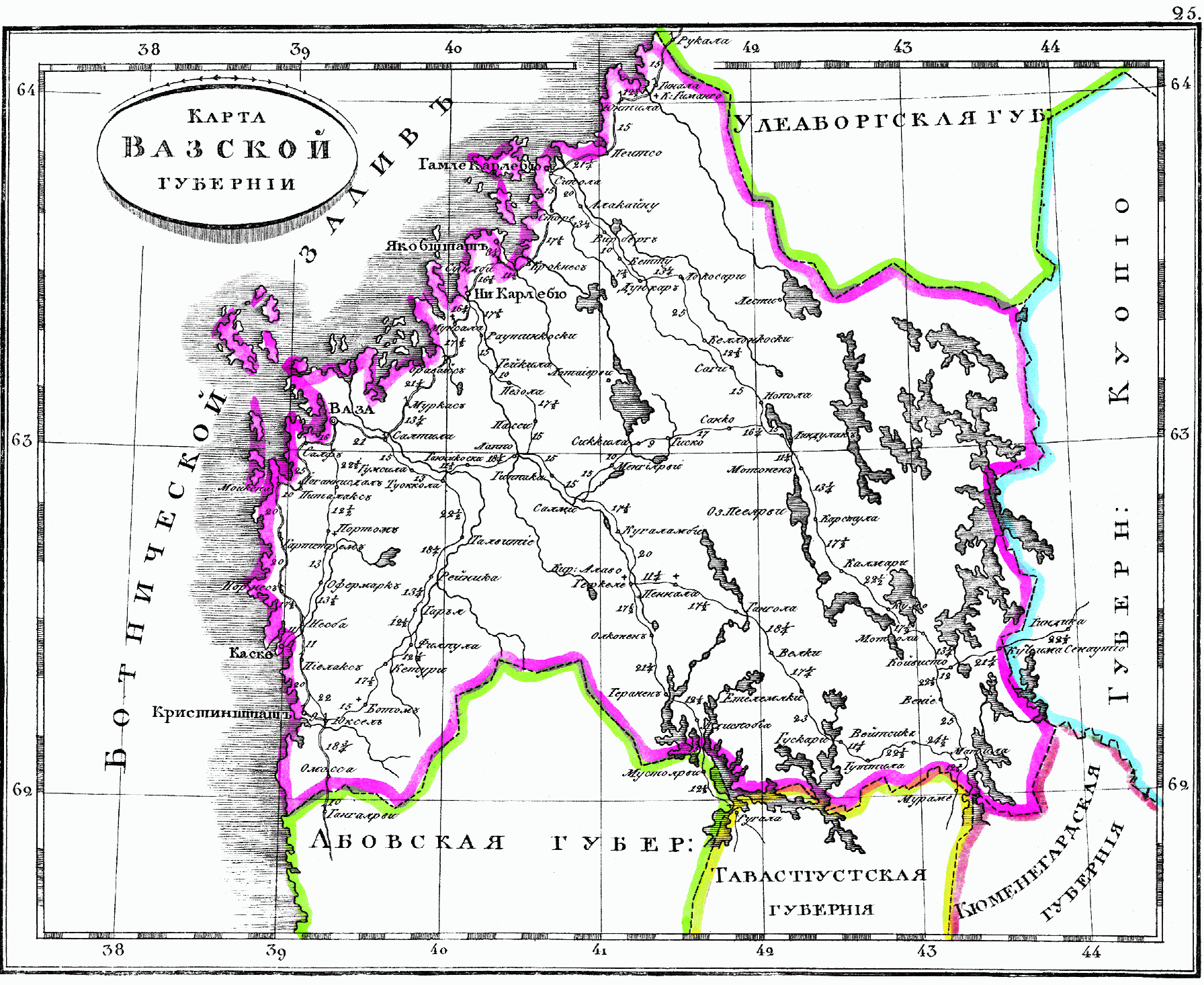 Карта Вазской губернии Великого княжества Финляндского, 1835